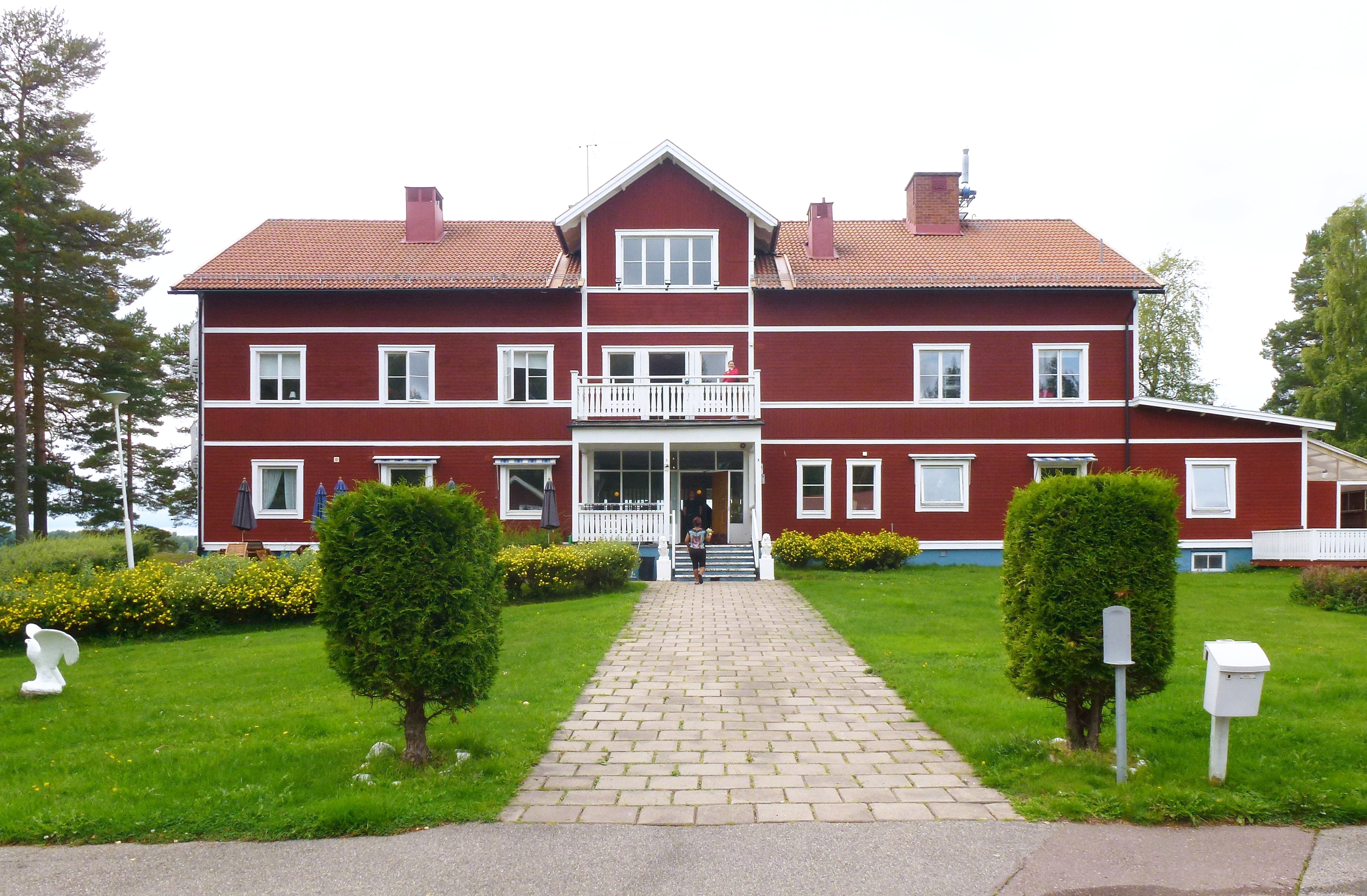 Kursgården Saxenborg